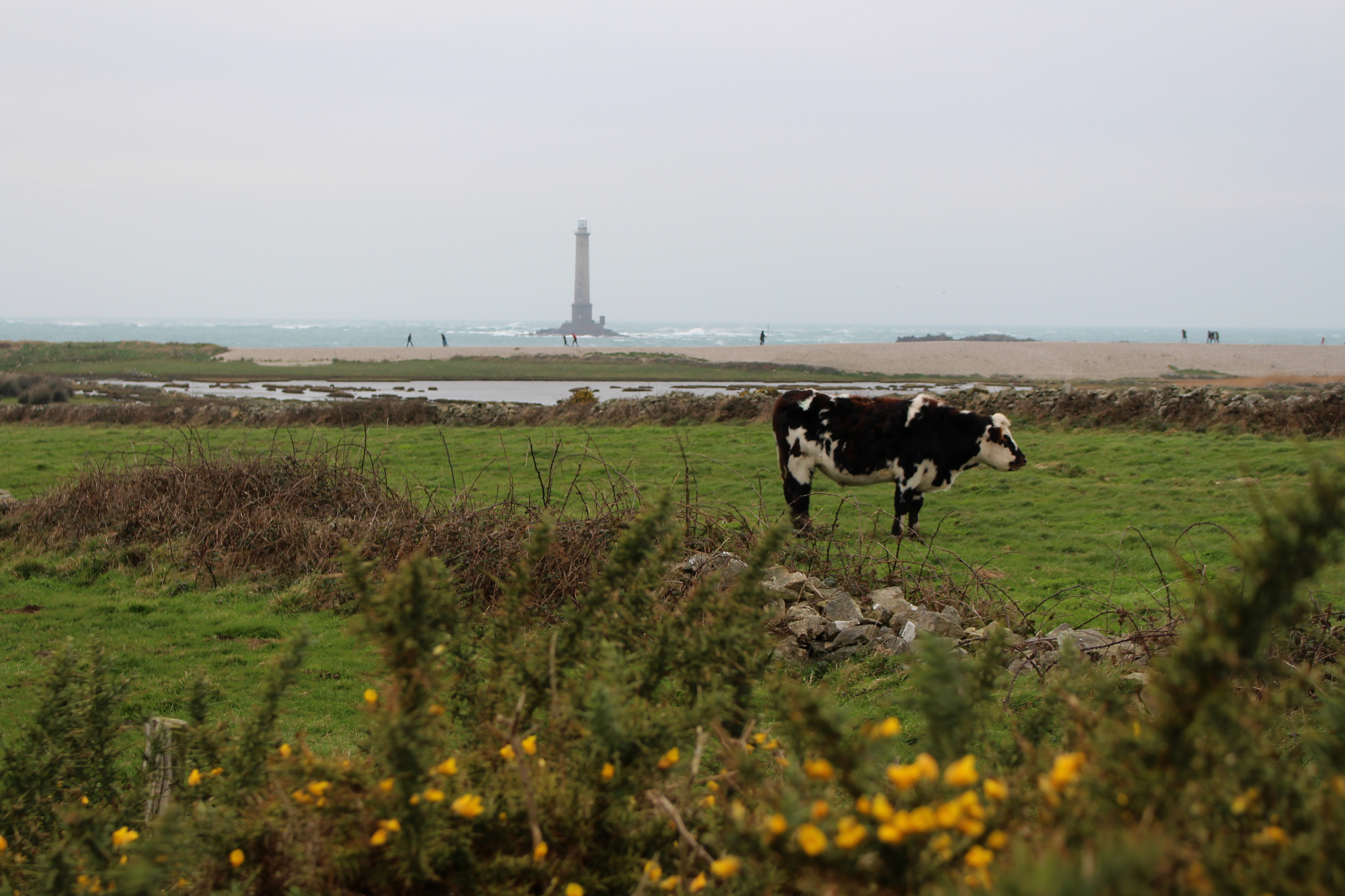 Goury, Auderville, Manche